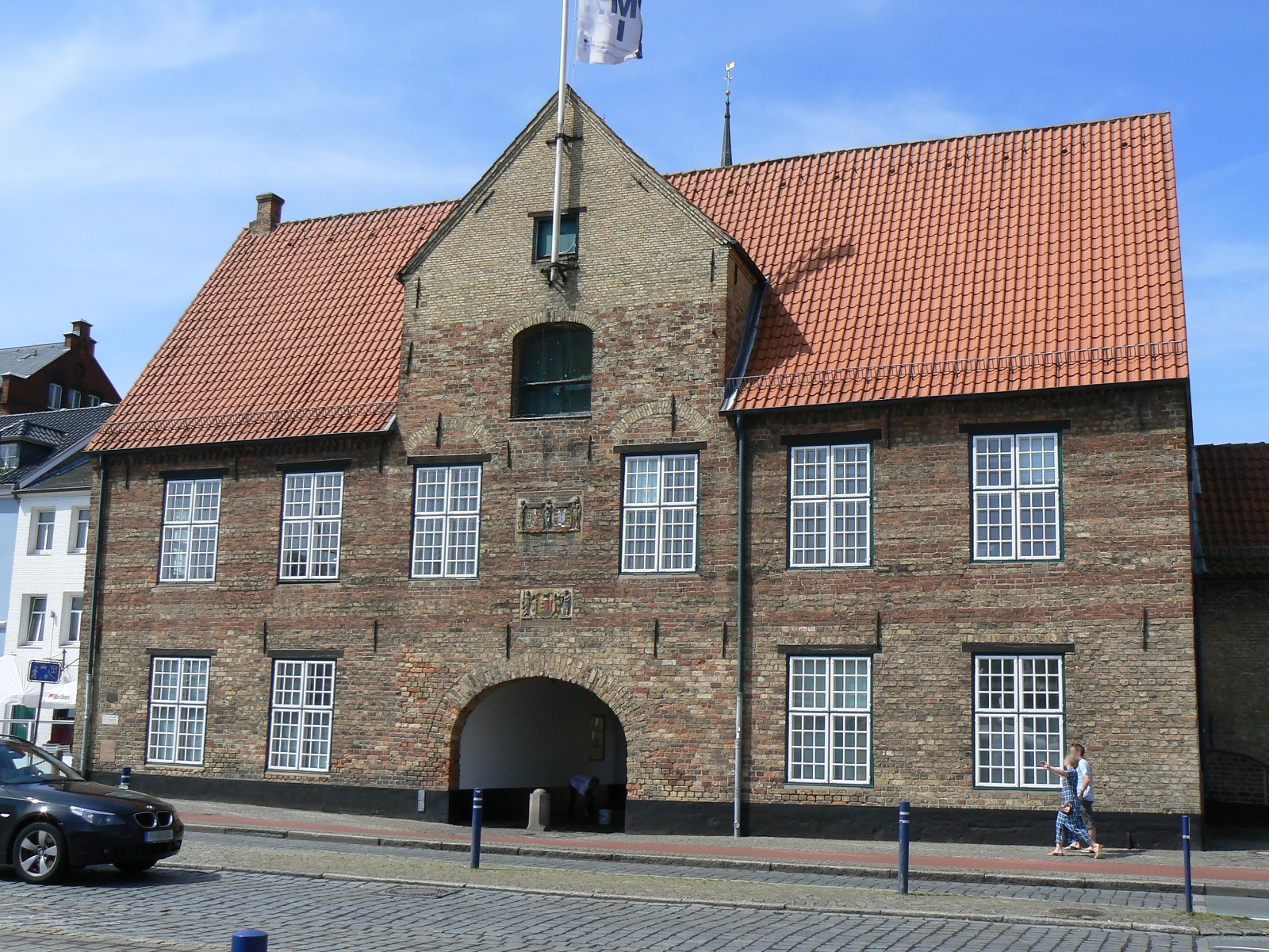 Kompagnietor in Flensburg. Erbaut: 1602.